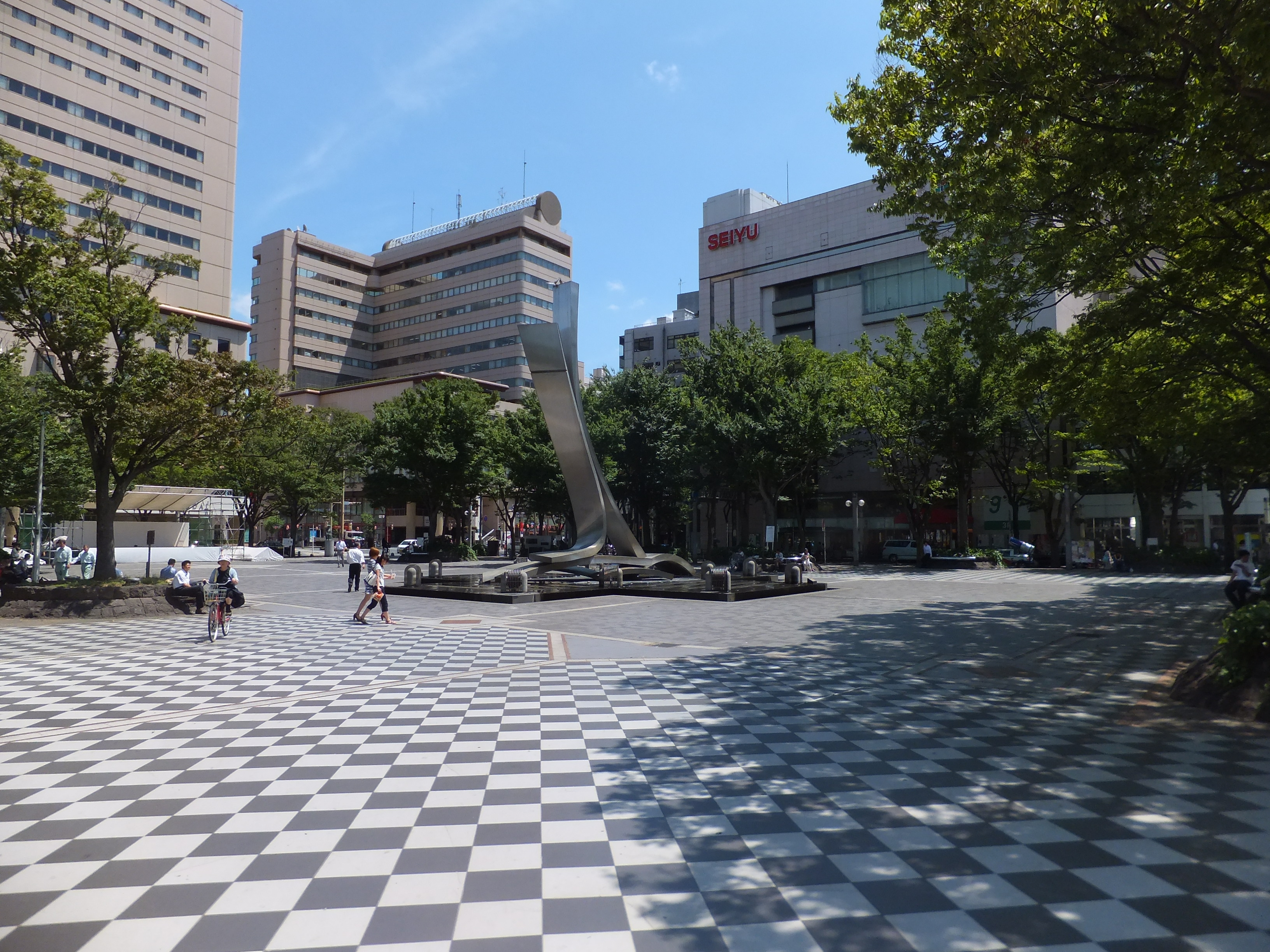 千葉市中央区、中央公園